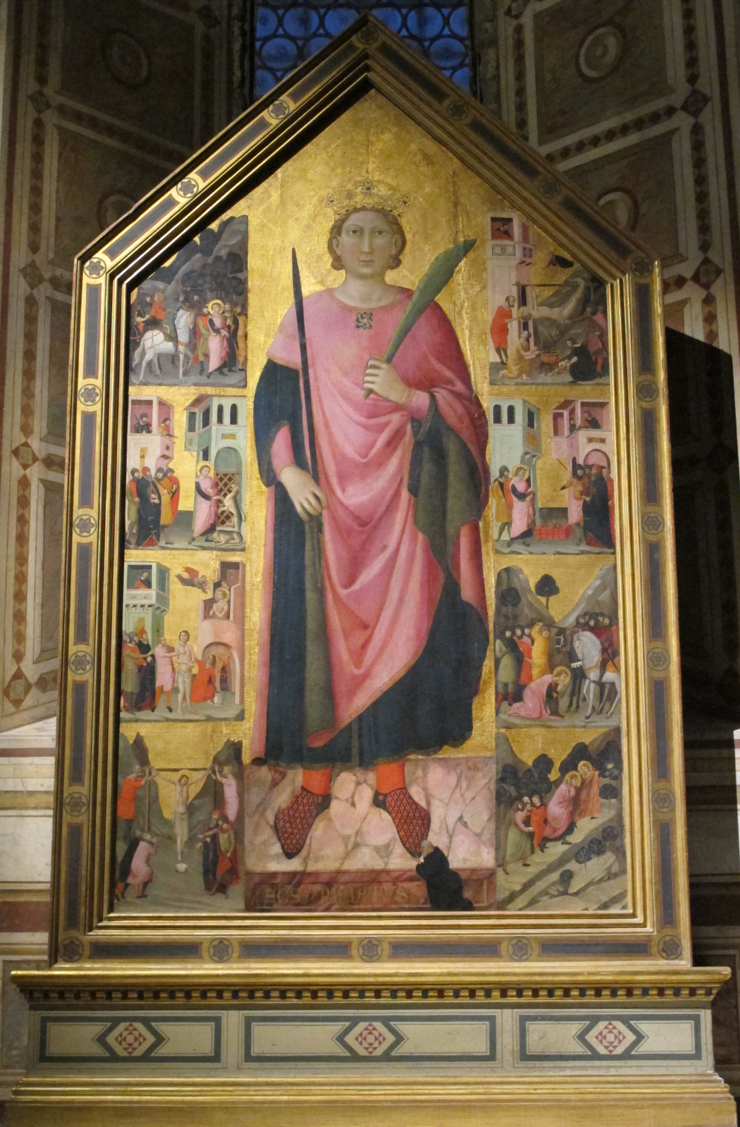 San Miniato al Monte, Firenze